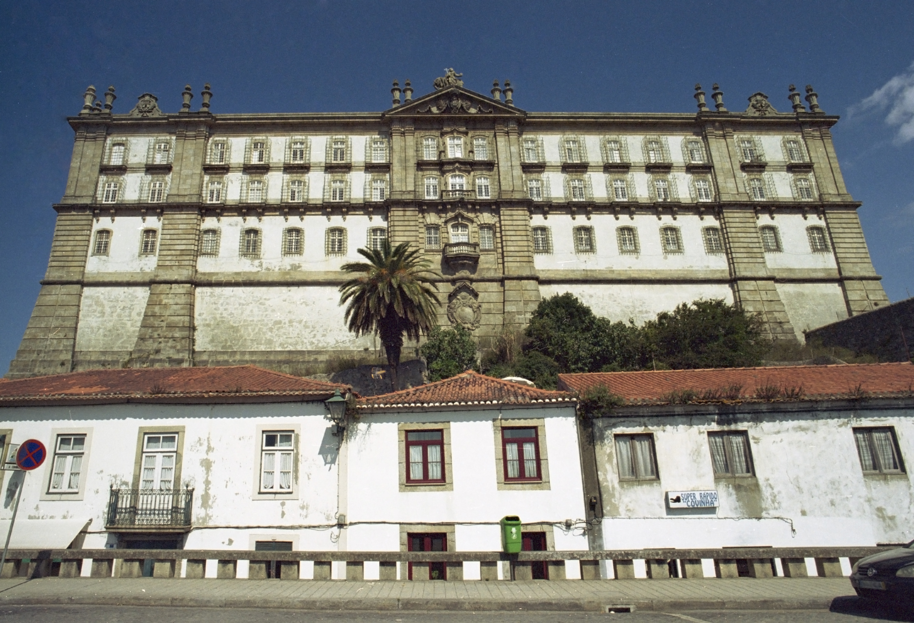 Convento de Santa Clara (Vila do Conde)